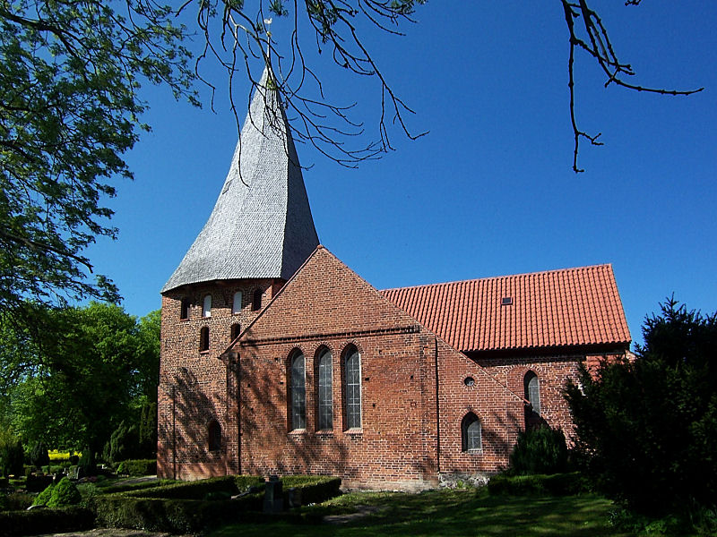 Kirche in Elmenhorst, Landkreis Nordwestmecklenburg